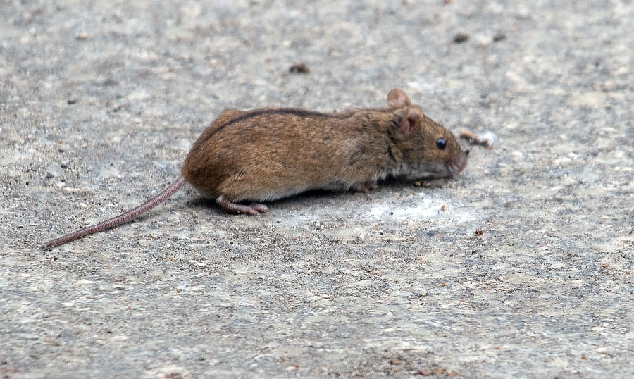 Brandmaus (Apodemus agrarius) auf den Stufen zum Tümpel am Britzer Schloß in Berlin Neukölln